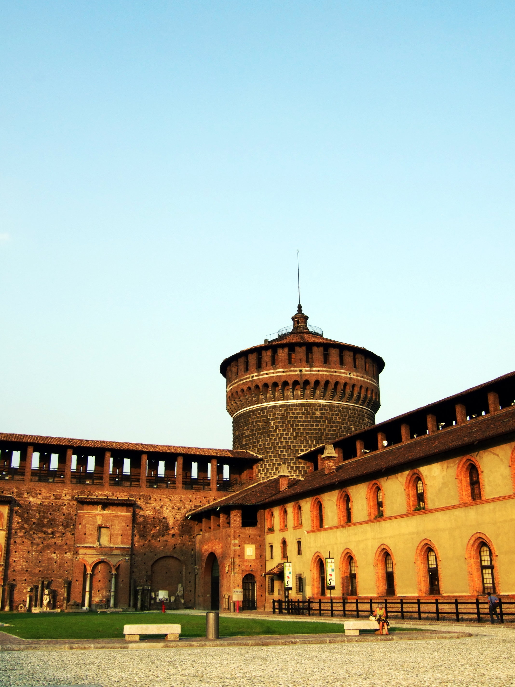 Castello Sforzesco, Innenhof